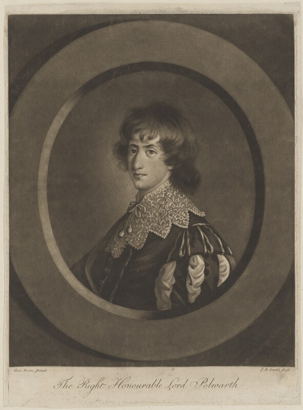 Porträt Alexander Hume, Lord Polwarth, veröffentlicht 1773